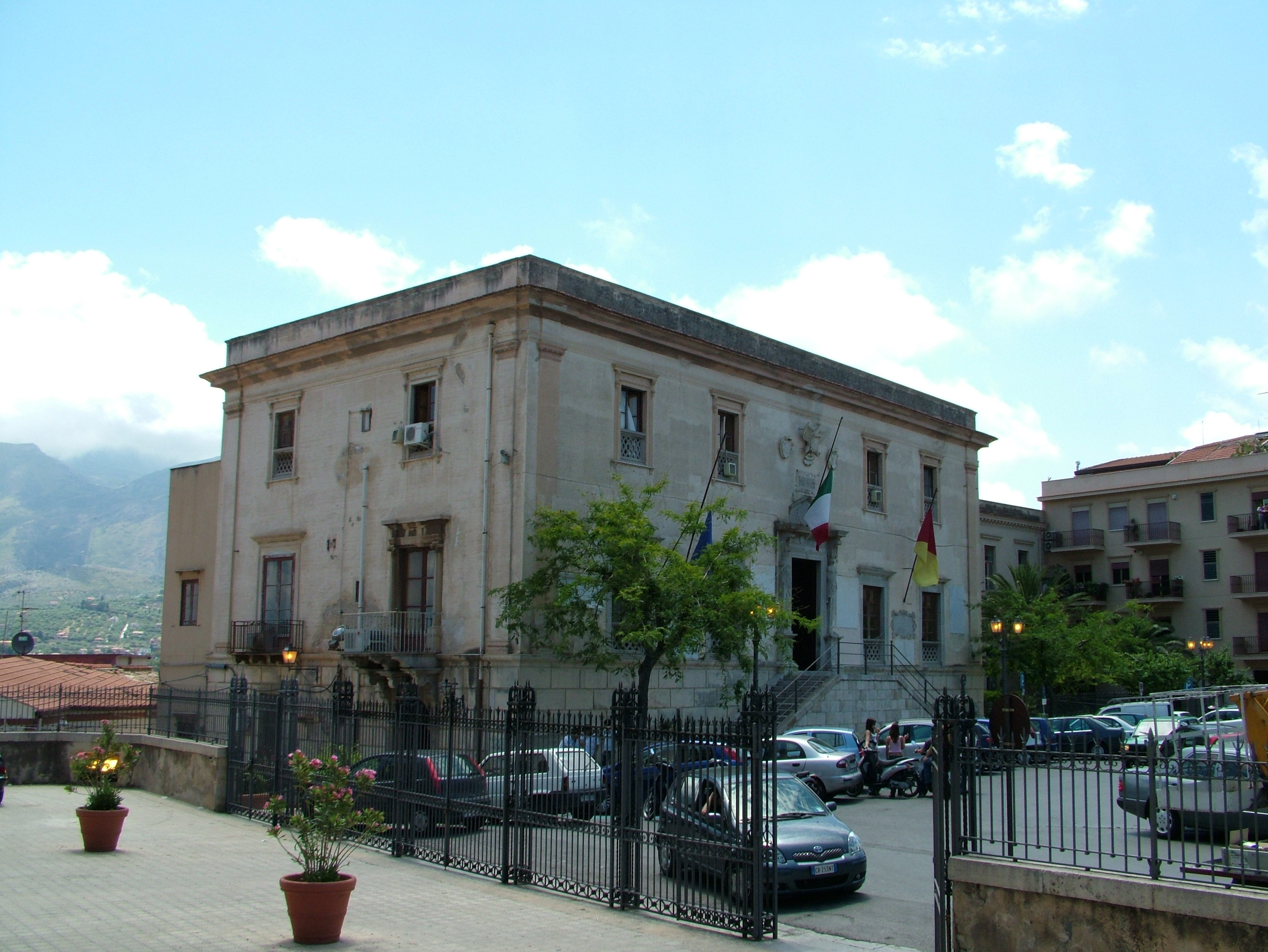 Termini Imerese, Sizilien, das Stadthaus ma Dom